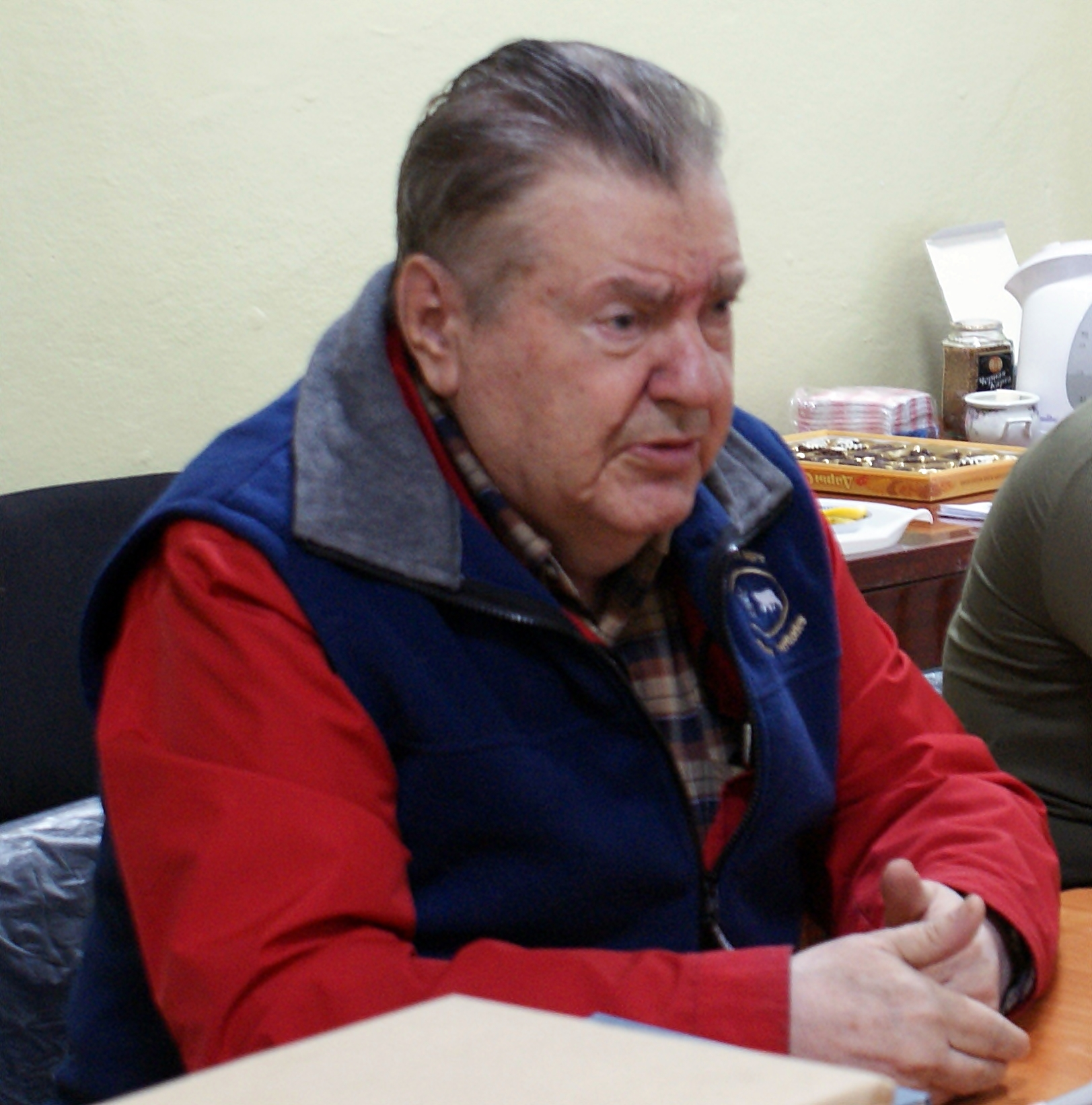 Ц. П. Короленко на презентации своей книги «Сексуальность в постсовременном мире» 15 сентября 2010 года.